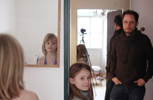 Vater mit Toechtern